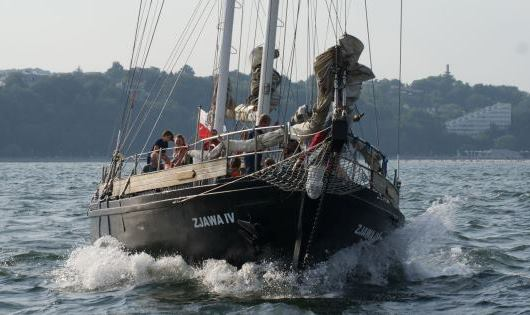 SY Zjawa IV wypływa z Gdyni